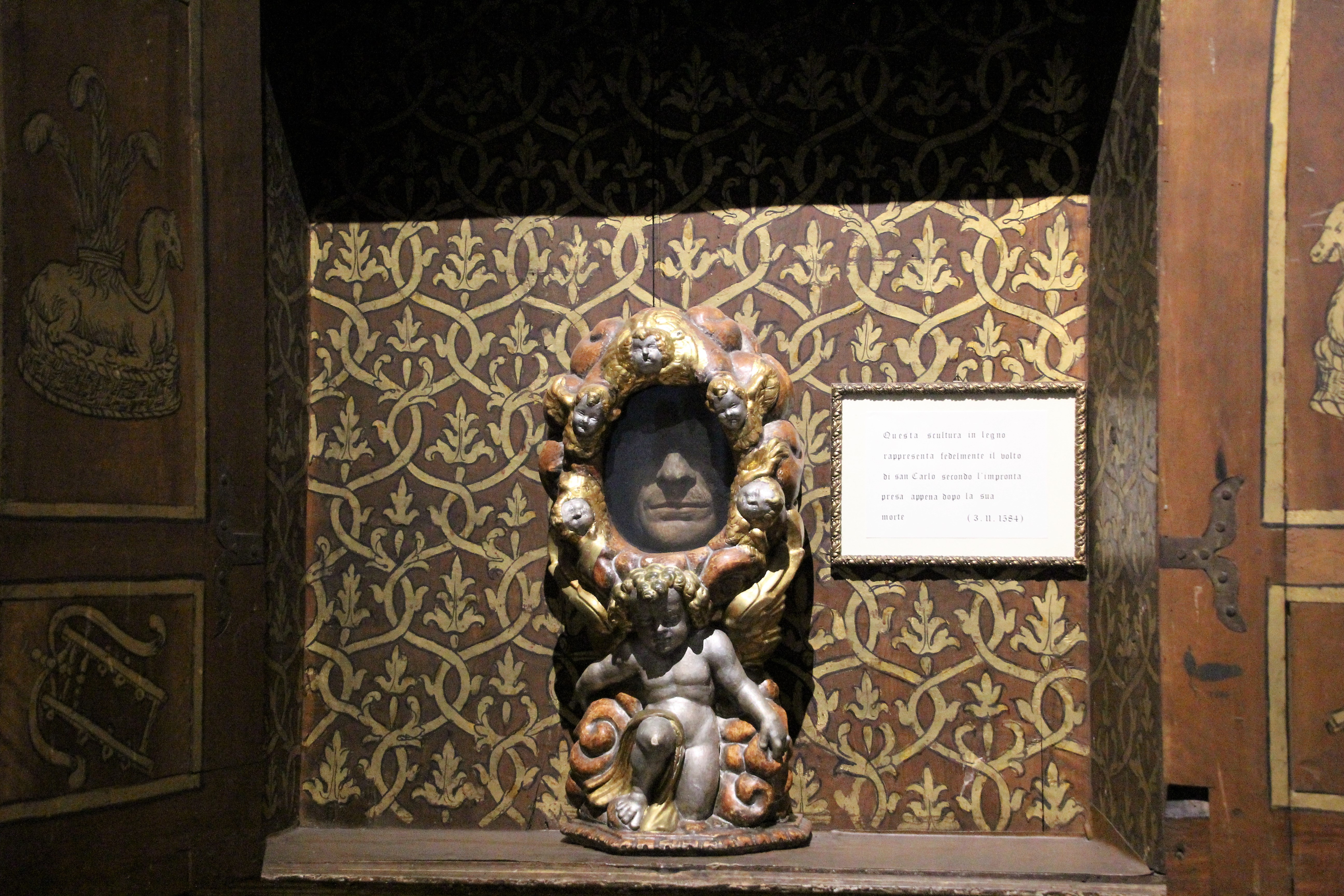 Arona, chiesa di San Carlo